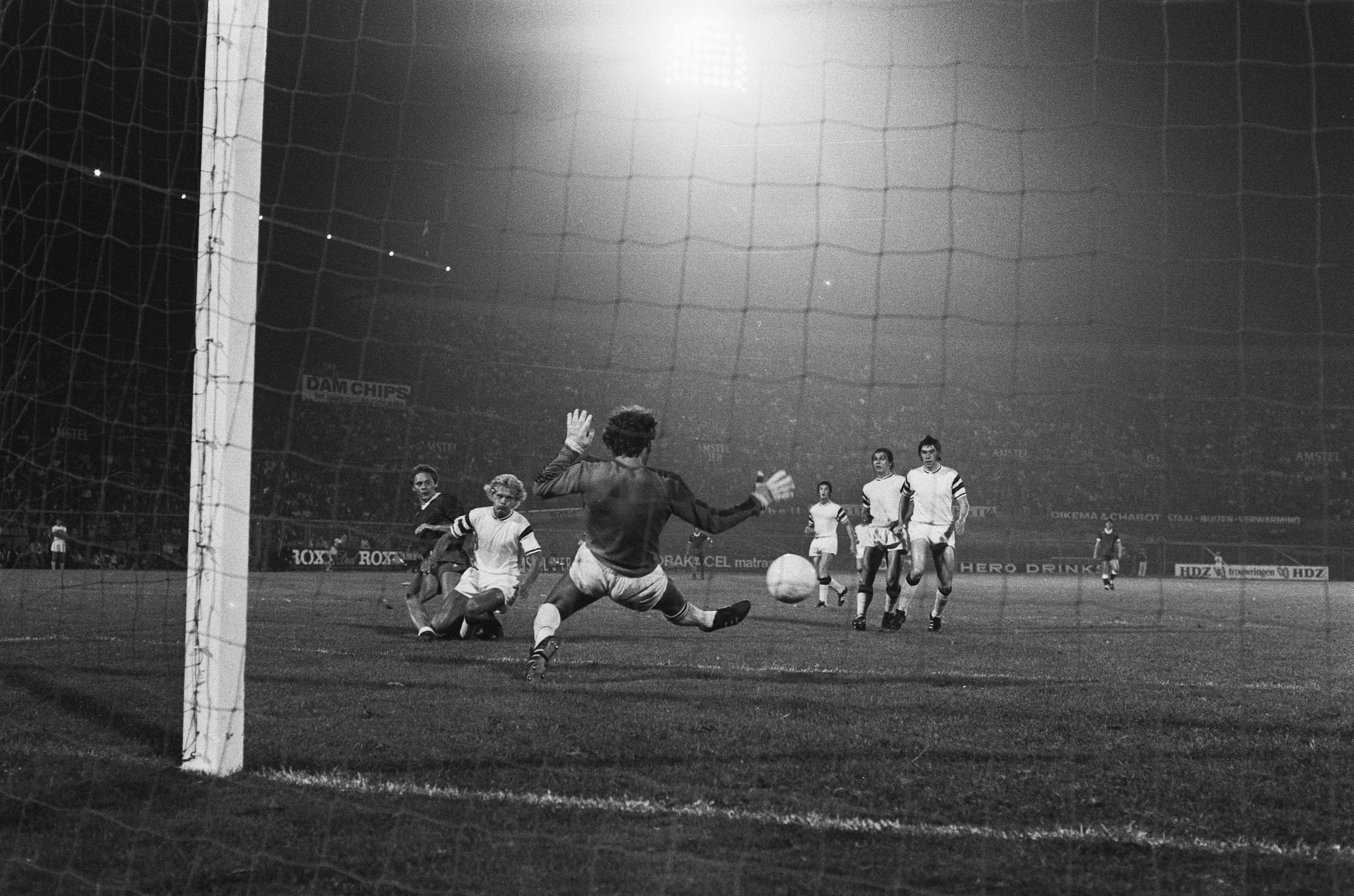 Collectie / Archief : Fotocollectie Anefo Reportage / Serie : Voetbaltoernooi Amsterdam-700 Beschrijving : Steffenhagen scoort de gelijkmaker in de wedstrijd Ajax-Molenbeek Datum : 10 augustus 1975 Locatie : Amsterdam, Noord-Holland Trefwoorden : toernooien, voetbal Fotograaf : Fotograaf Onbekend / Anefo Auteursrechthebbende : Nationaal Archief Materiaalsoort : Negatief (zwart/wit) Nummer archiefinventaris : bekijk toegang 2.24.01.05 Bestanddeelnummer : 928-0926